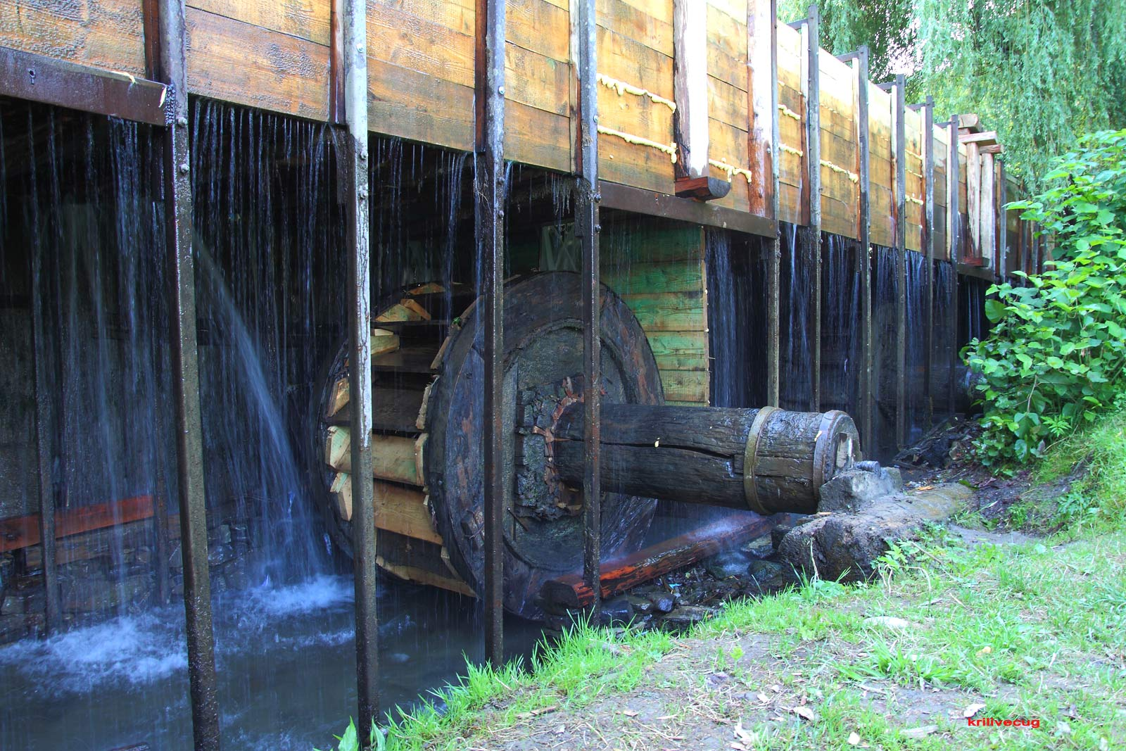 Колесо водяного млина Гамори. Село Лисичево. Іршавського району.